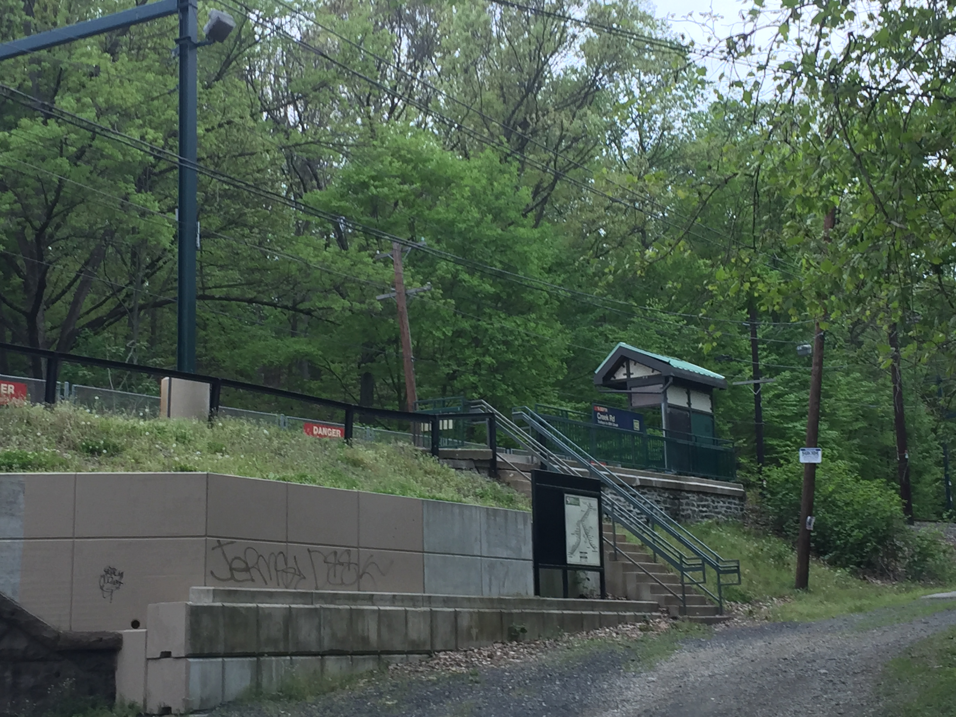 Creek Road